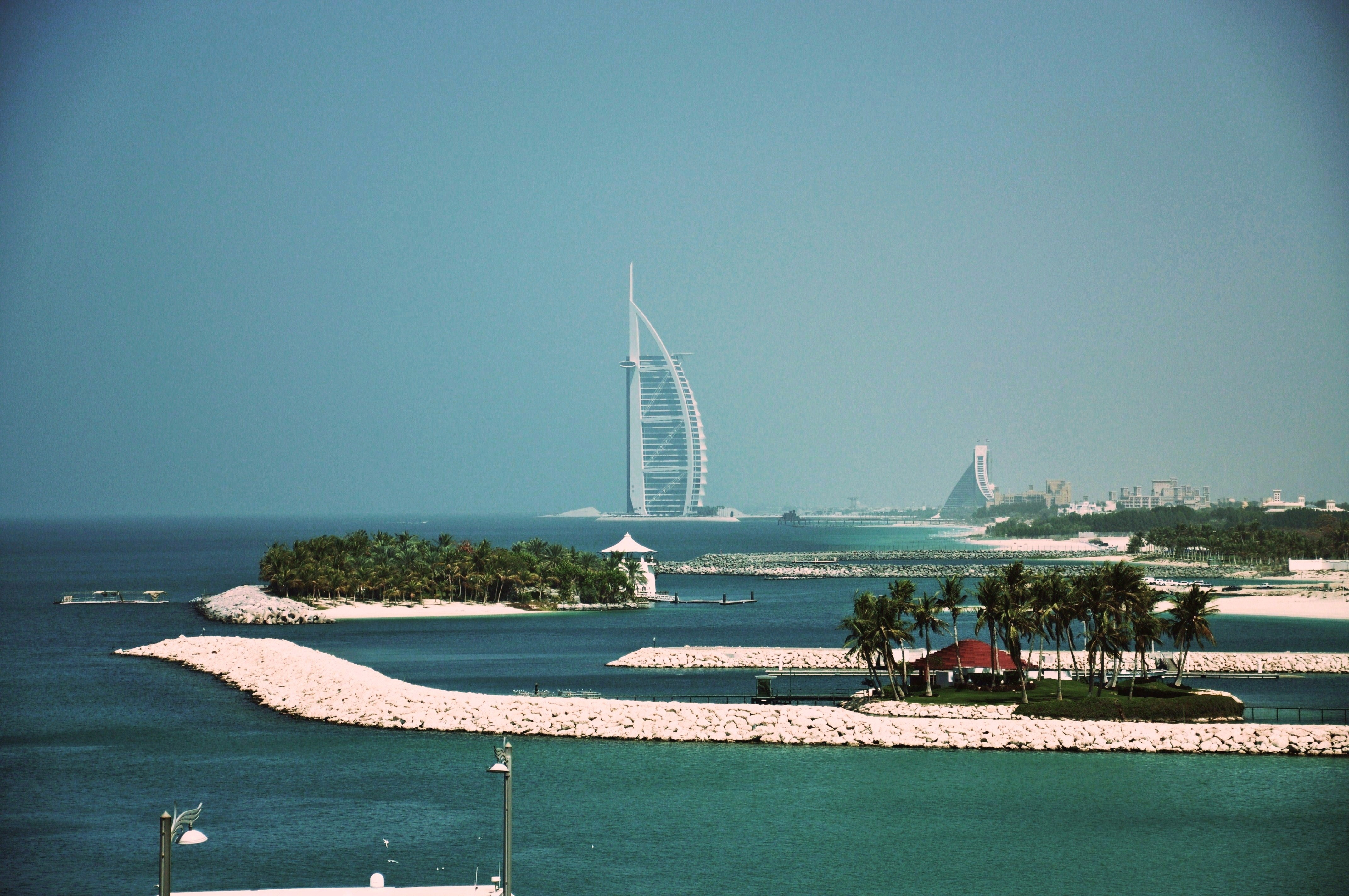 emiratos arabes